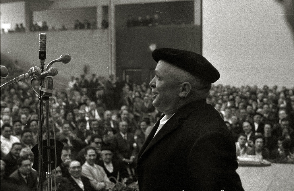 Título original: Campeonato de bertsolaris celebrado en el frontón Anoeta (7/17) Localización: San Sebastián (Guipúzcoa)